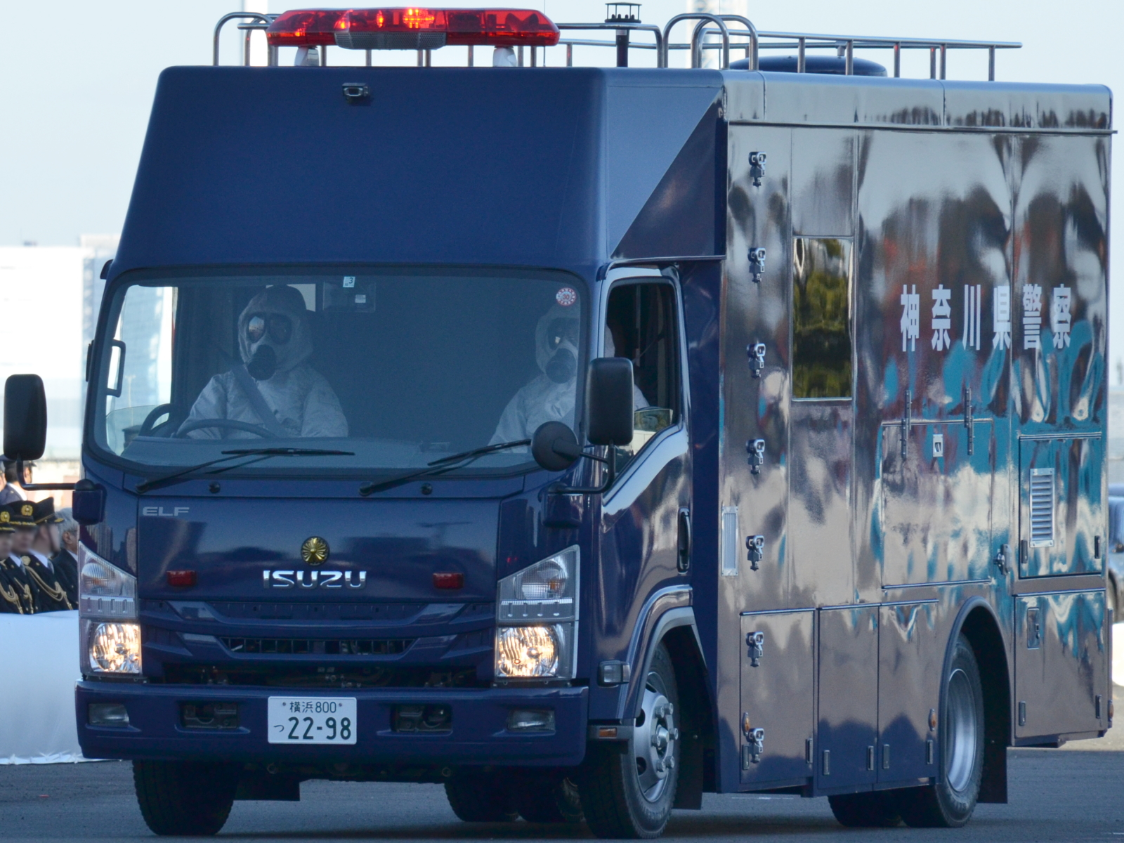 神奈川県警のエルフNBCテロ対策車